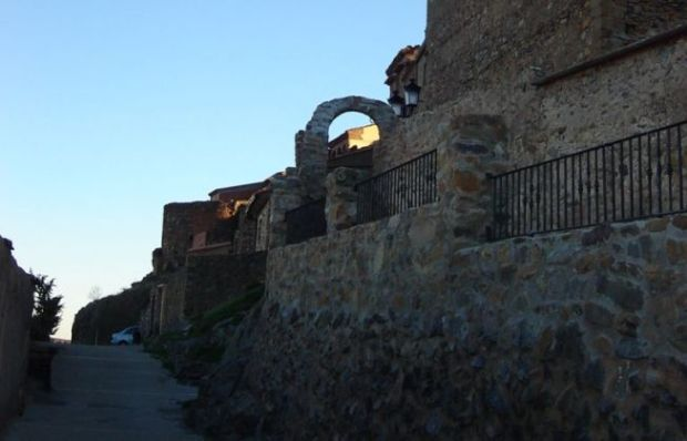 Alcalá de Moncayo Wall, Restos de muralla de Alcalá de Moncayo